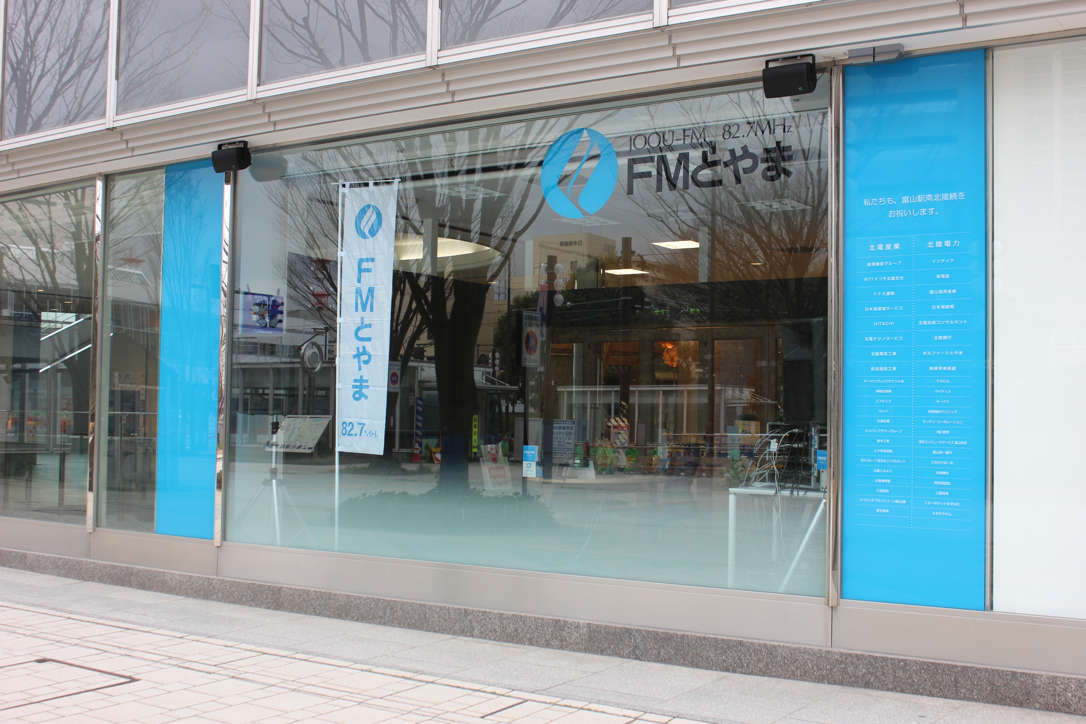 富山エフエム放送（FMとやま）のサテライトスタジオ「アーバンスタジオ」。 Canon EOS Kiss X5